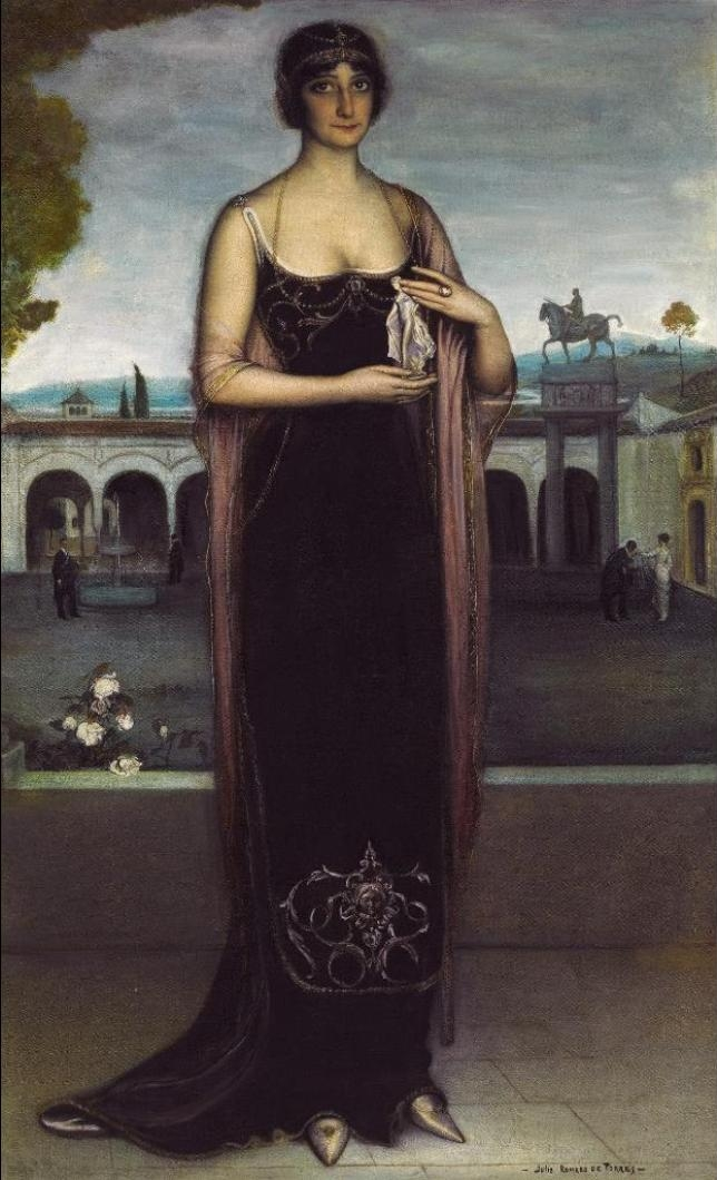 Adela Carbone, La Tanagra.